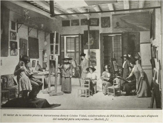 Taller LluisaVidal Publicat a la revista Feminal a l'abril de 1912